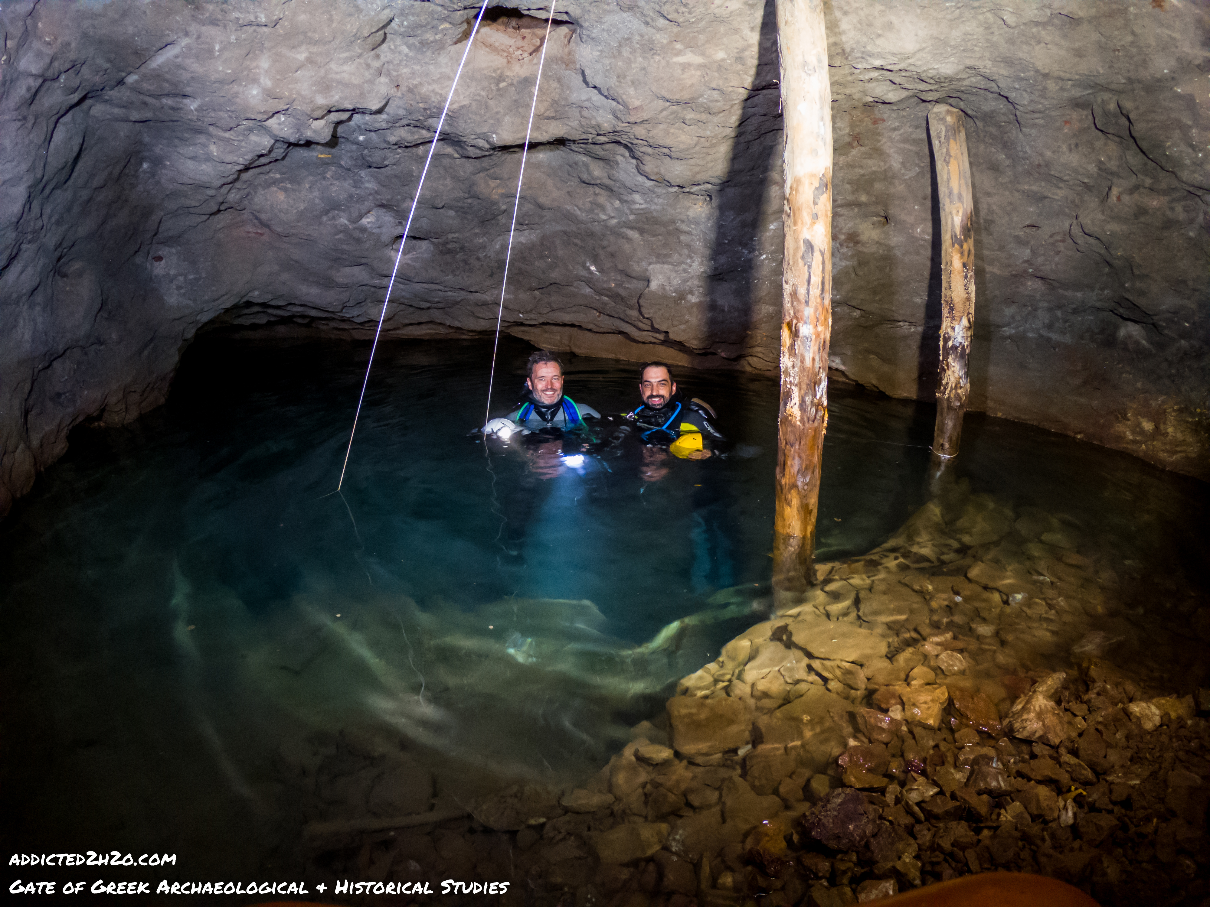 Οι δύτες μετά το πέρας της κατάδυσης.